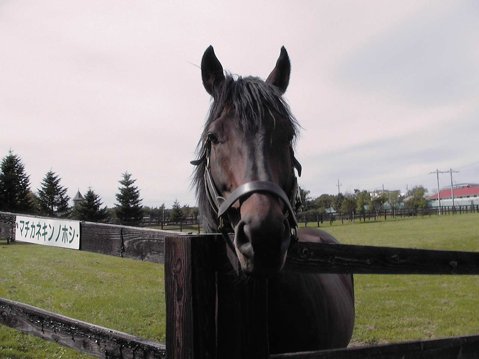 2006年に牧場見学でマチカネキンノホシを撮影